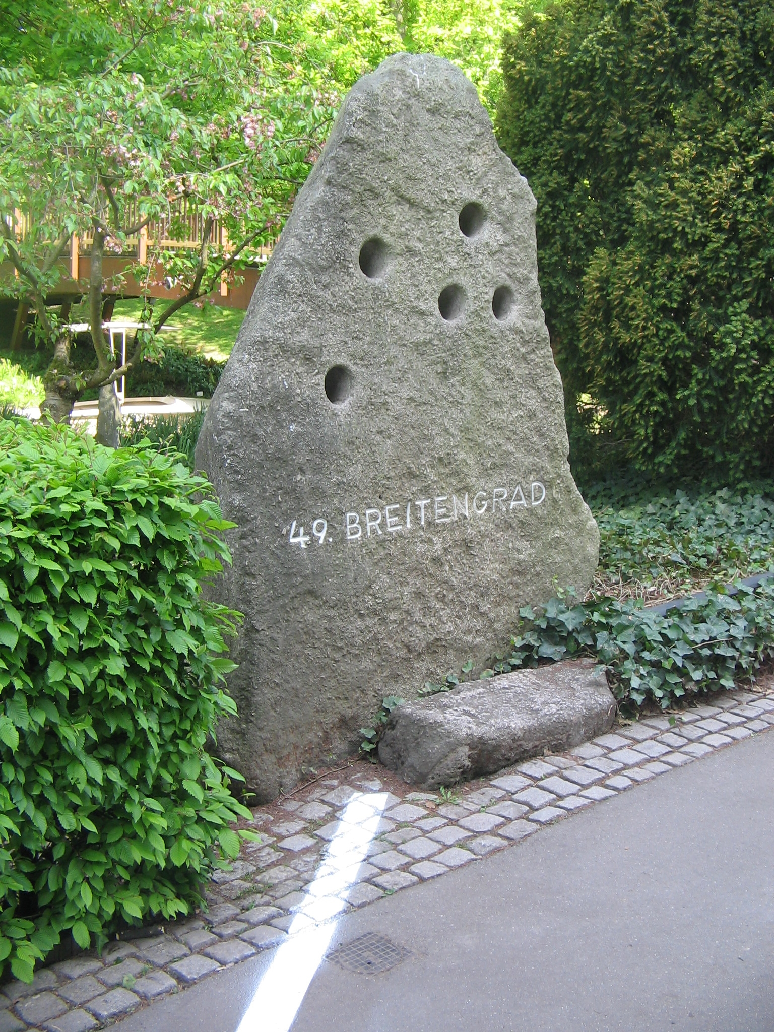 49th Parallel marked in Stadtgarten, Karlsruhe, Germany